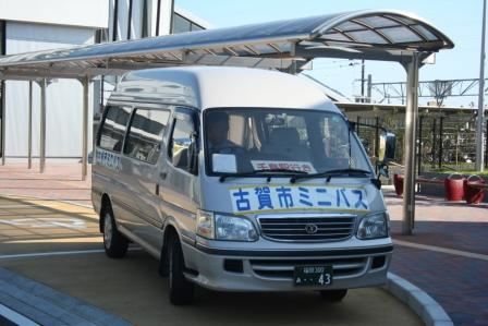 古賀市で運行されていたミニバス